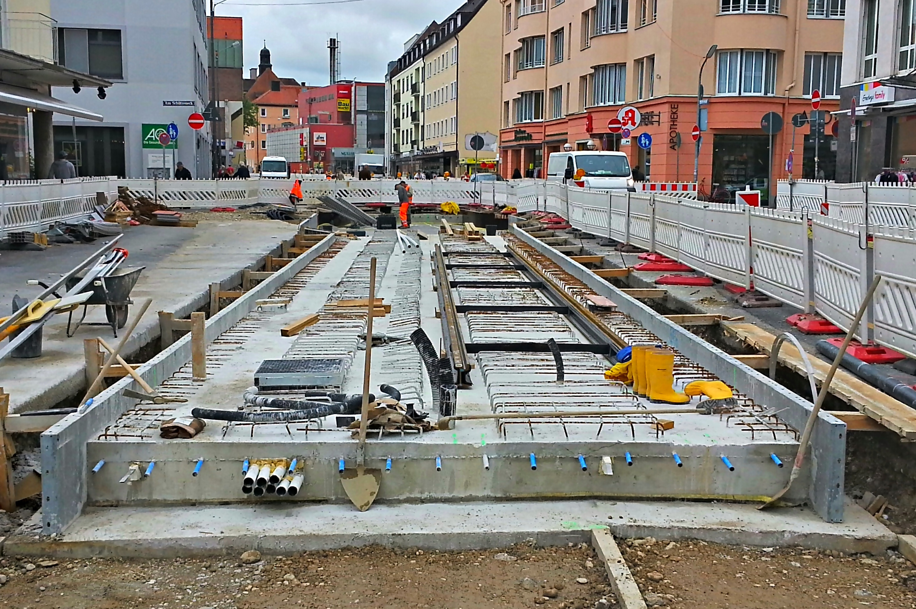 Errichtung eines Straßenbahngleisbettes im Juni 2013 im Münchner Stadtteil Pasing in der Bäckerstraße